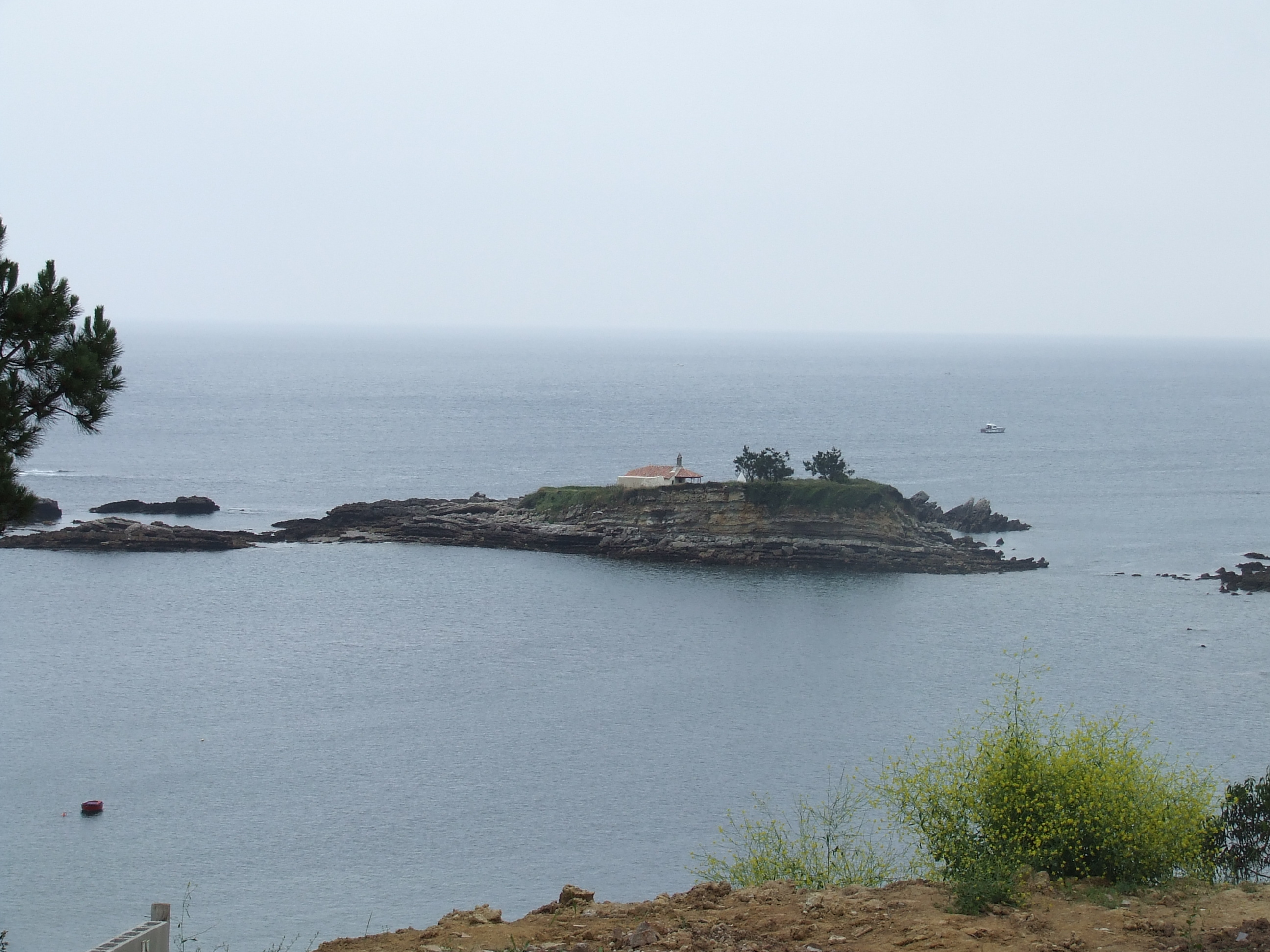 Isla del Carmen